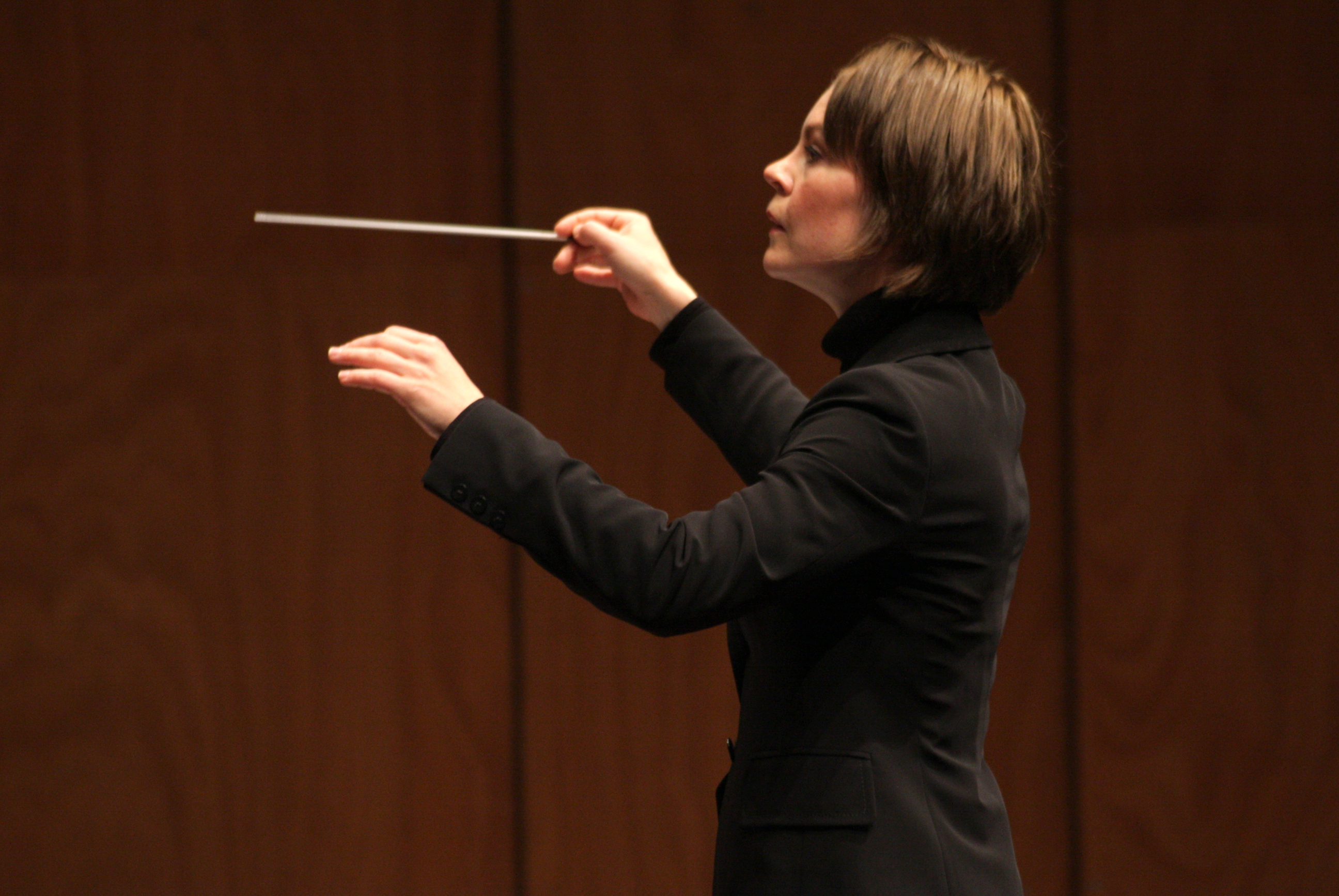 Palavela, 18 settembre 2008 Ensemble intercontemporain Susanna Mälkki, direttore